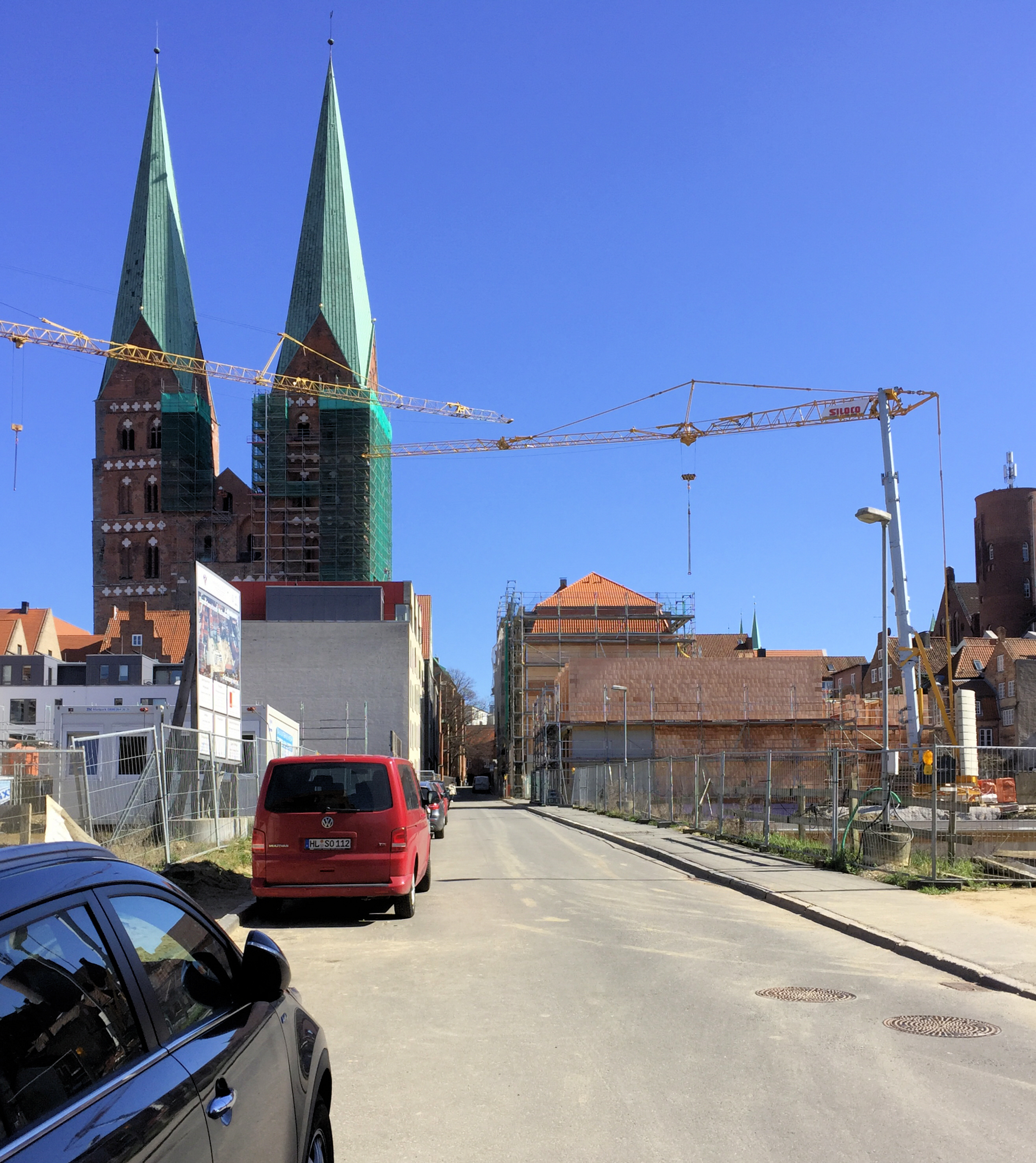 Die Fischstraße in Lübeck